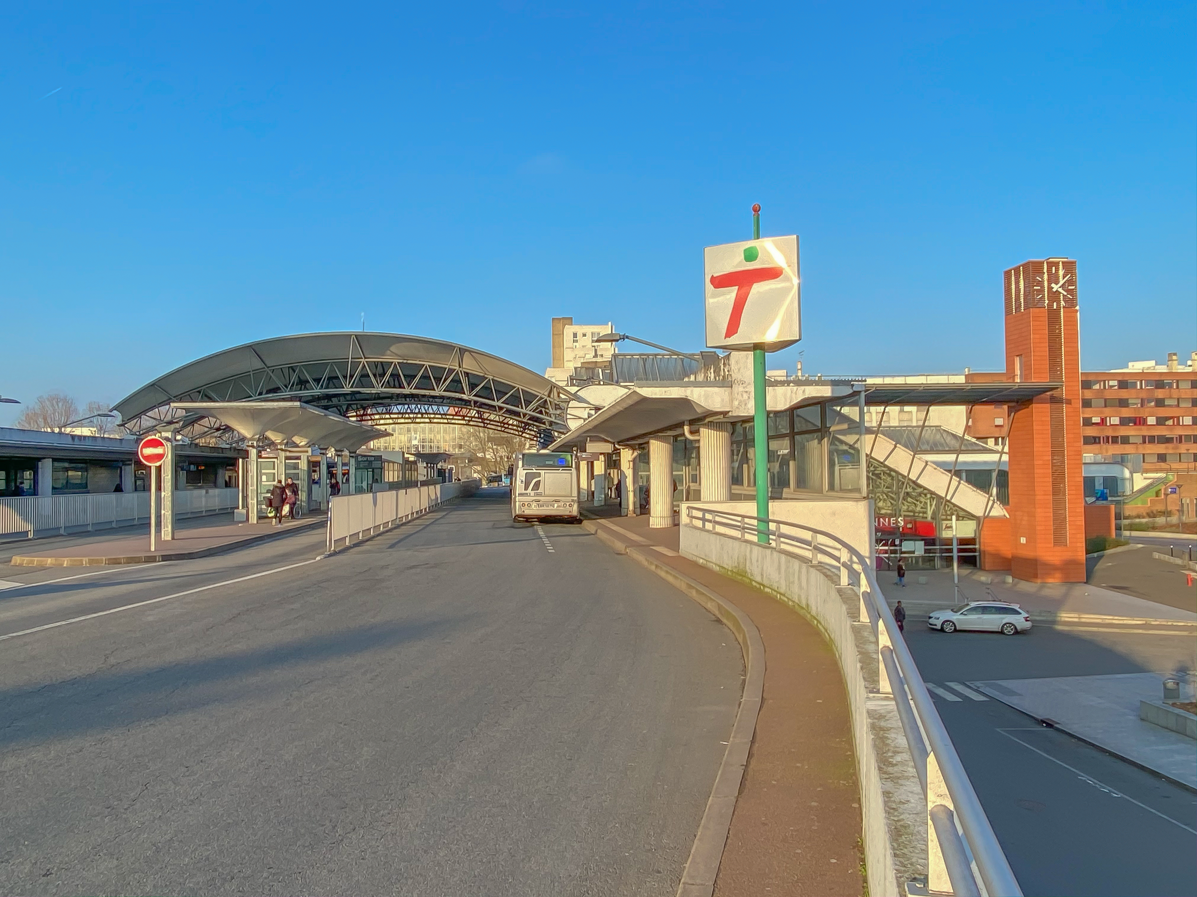 Gare routière d'Évry-Courcouronnes accolée à la gare ferroviaire d'Évry-Courcouronnes (côté ouest - niveau 1)